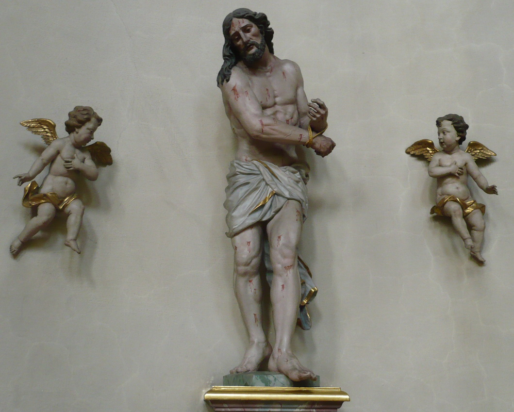 Darstellung des Jesus mit zwei Engeln.